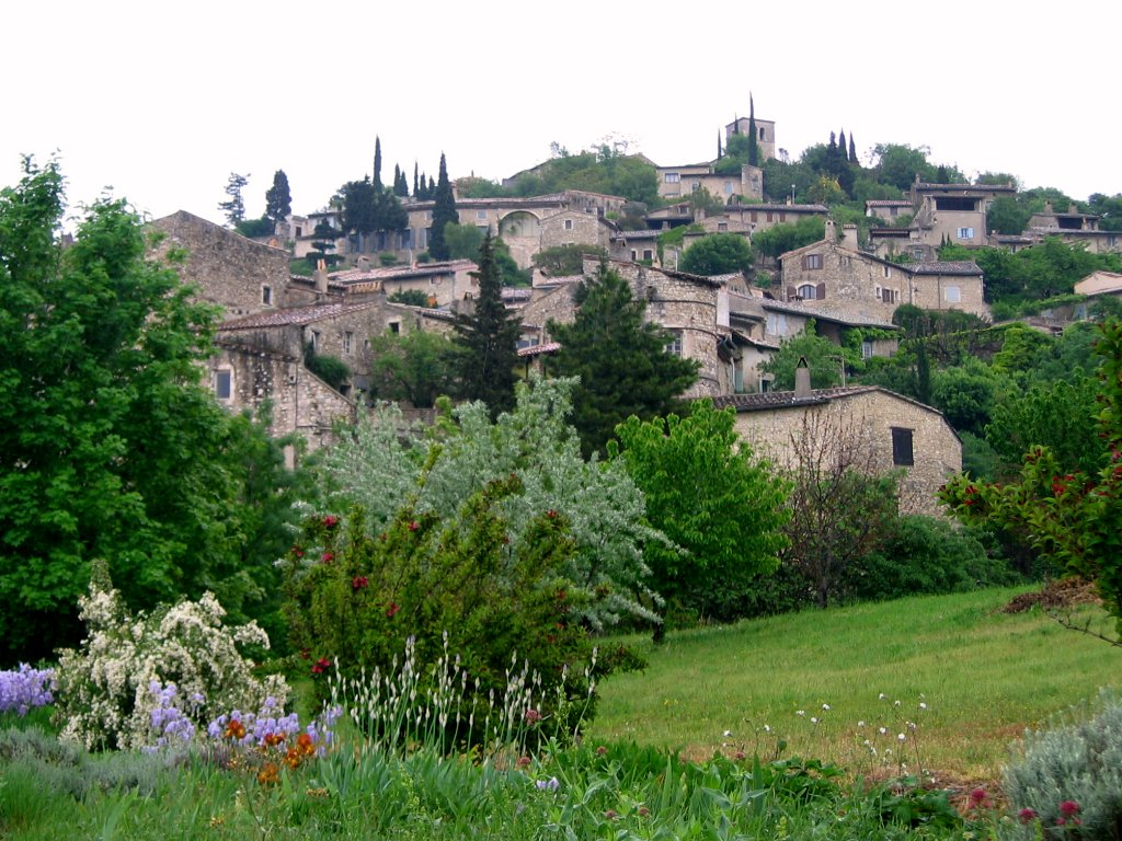 Vue générale de Mirmande (Drôme ; France). Photographie prise le 6 mai 2006.